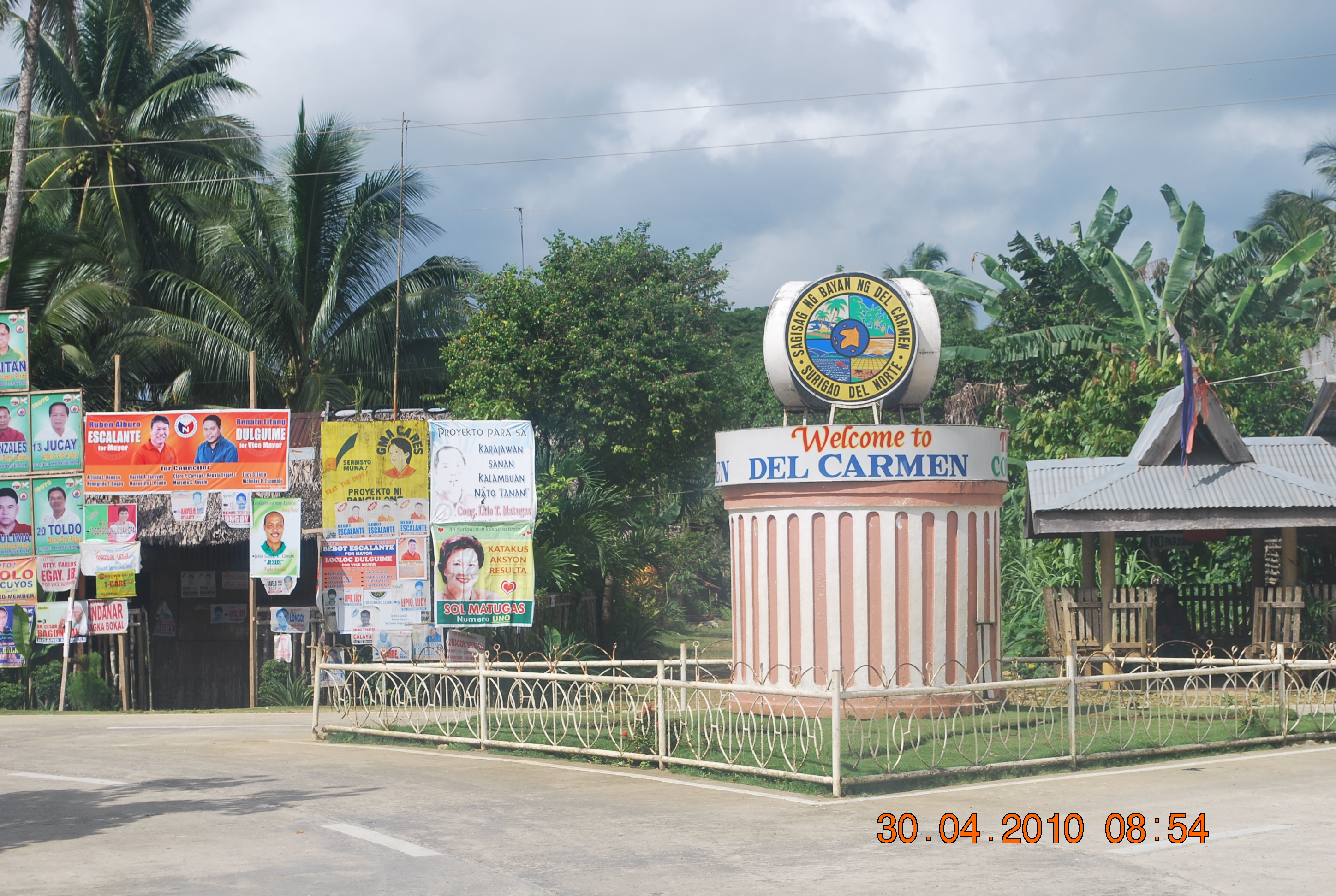 Del Carmen-San Isidro Junction